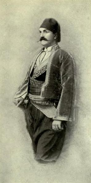 El rey Milan I de Serbia en traje de corte.